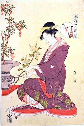 風流略六芸 生花